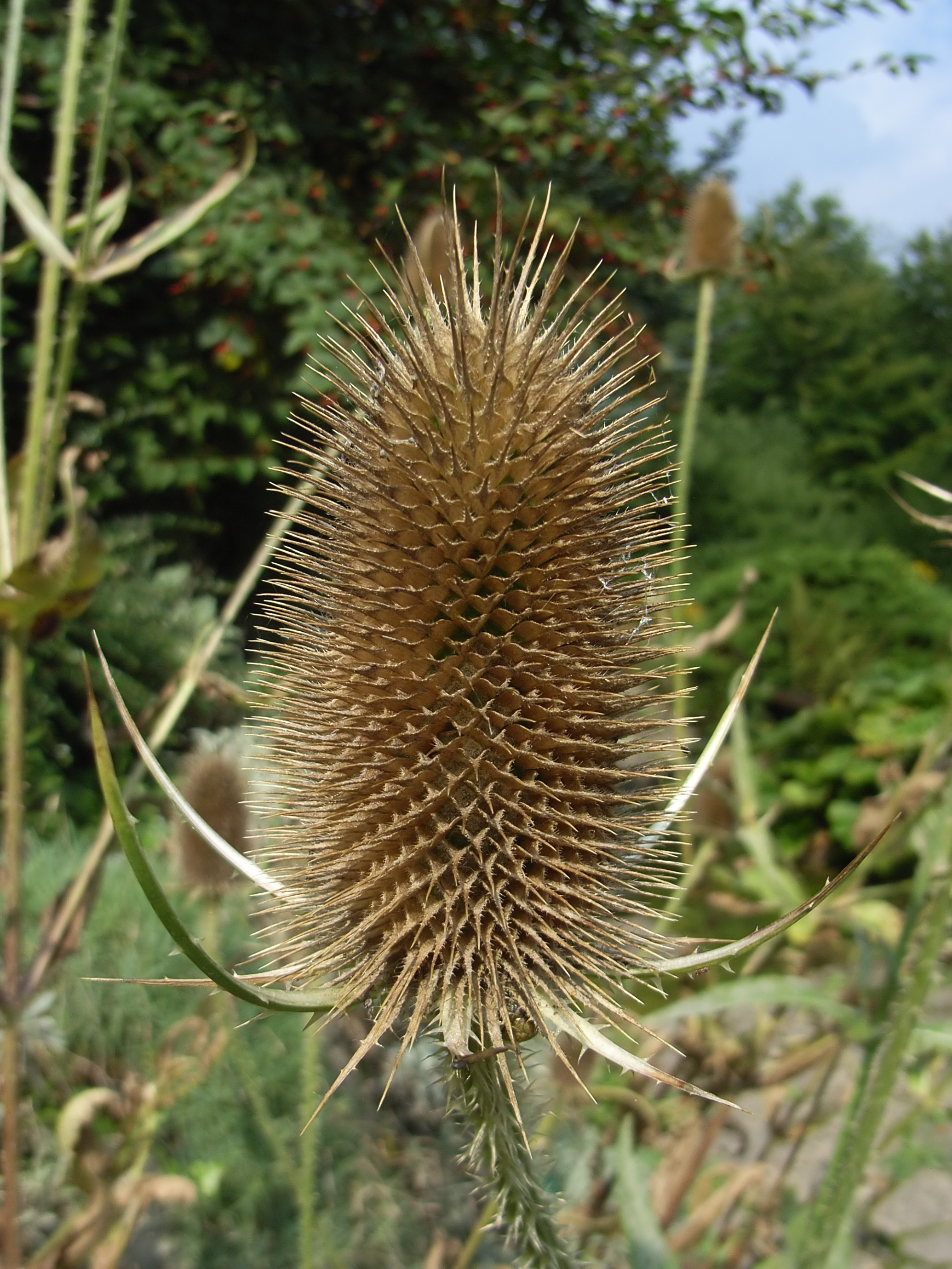 Dipsacus fullonum